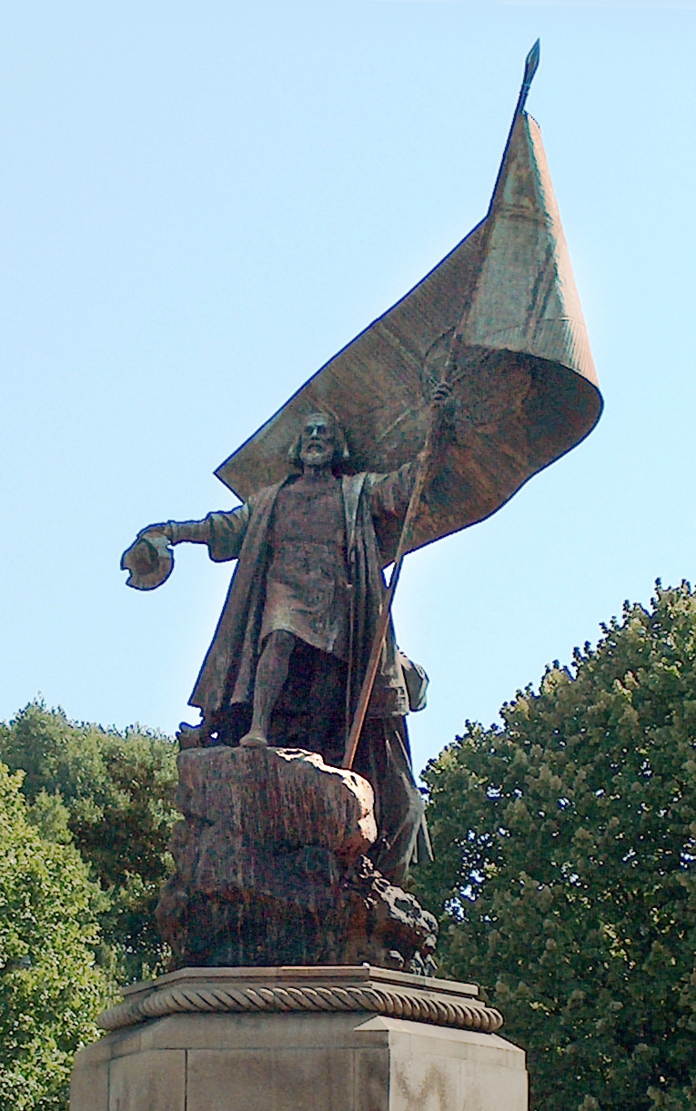 Depicted person: Pedro Álvares Cabral